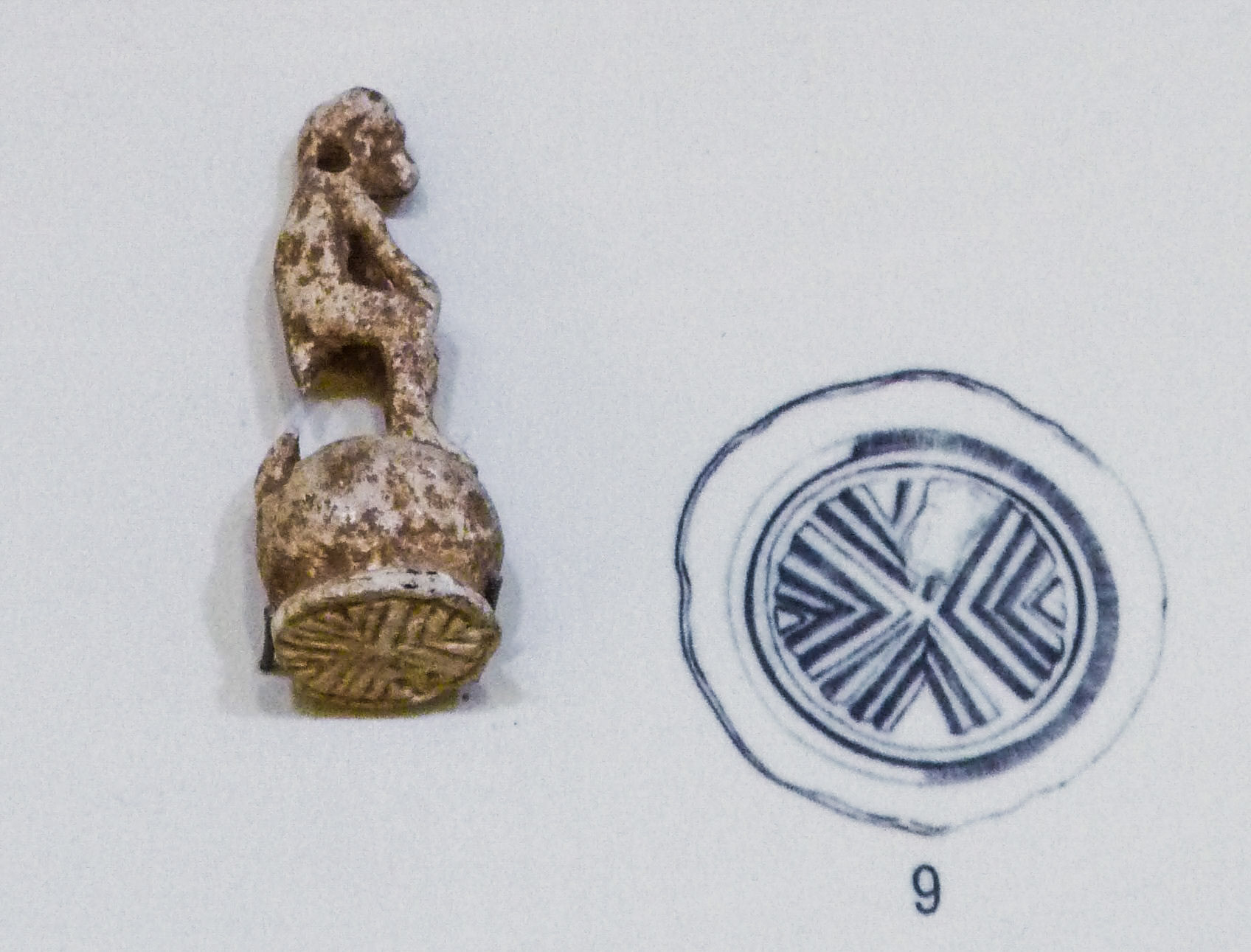 Sceau minoen